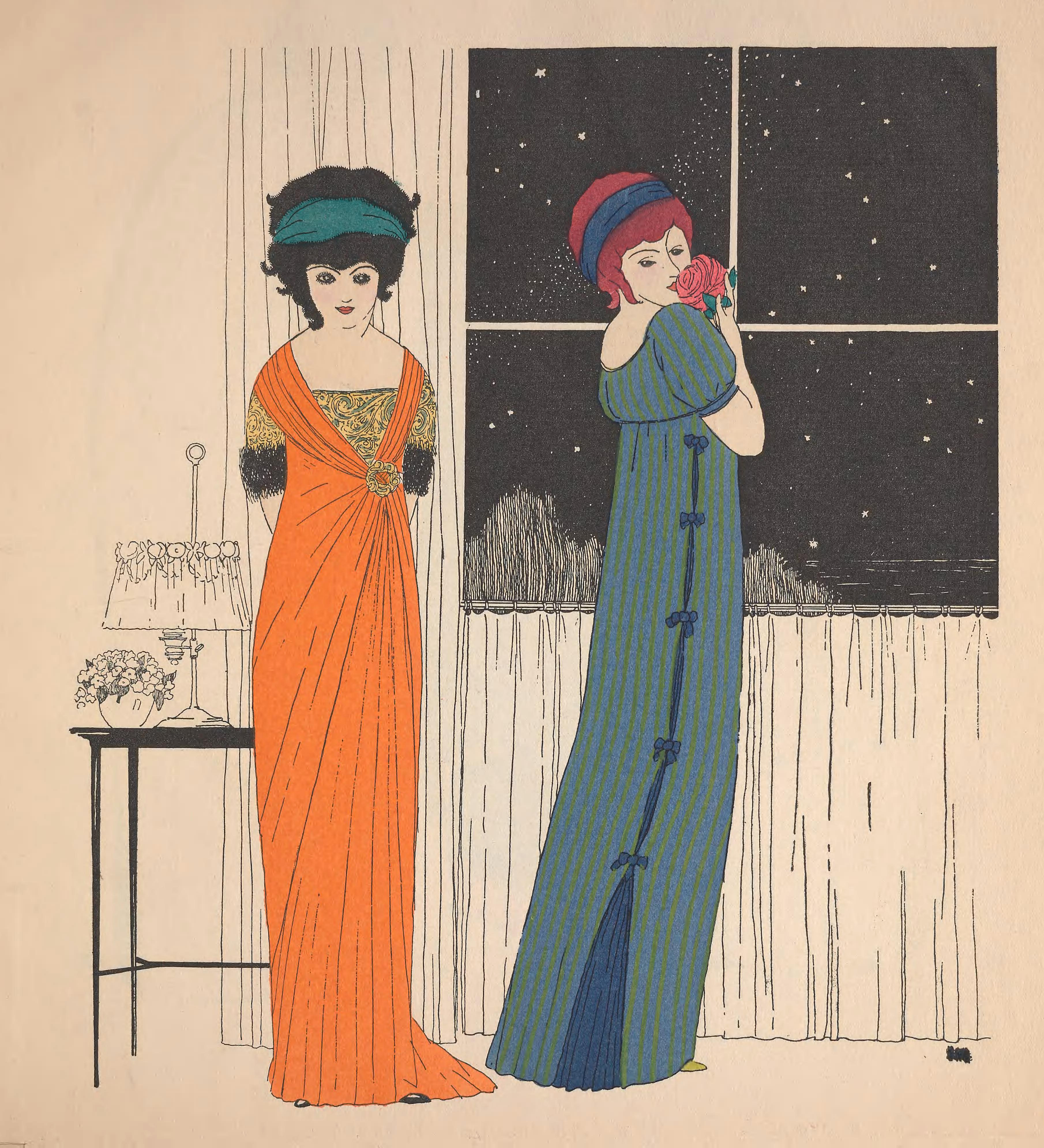 Illustration of two Paul Poiret dresses. Les Robes de Paul Poiret, p.27.